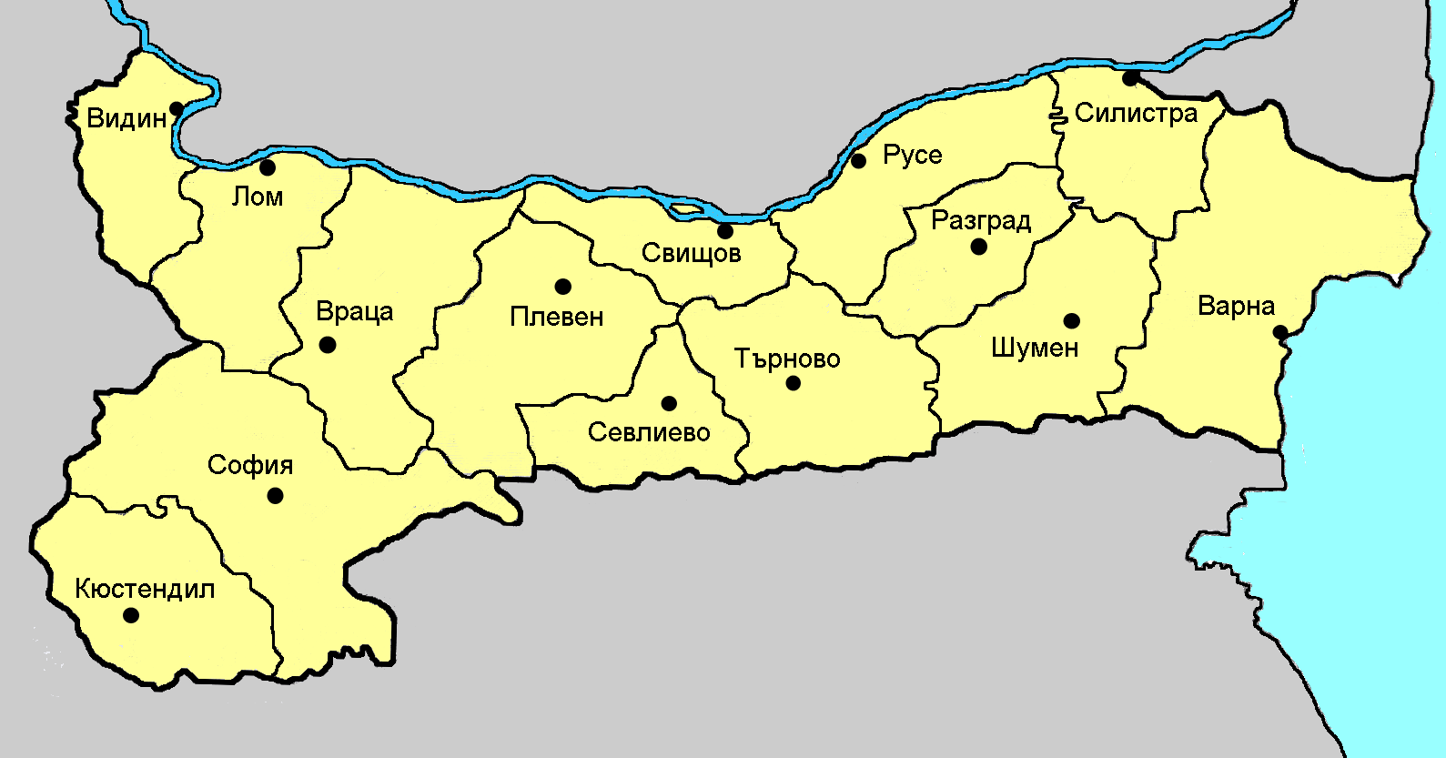 Административно-териториално деление на Княжество България 1882-1885